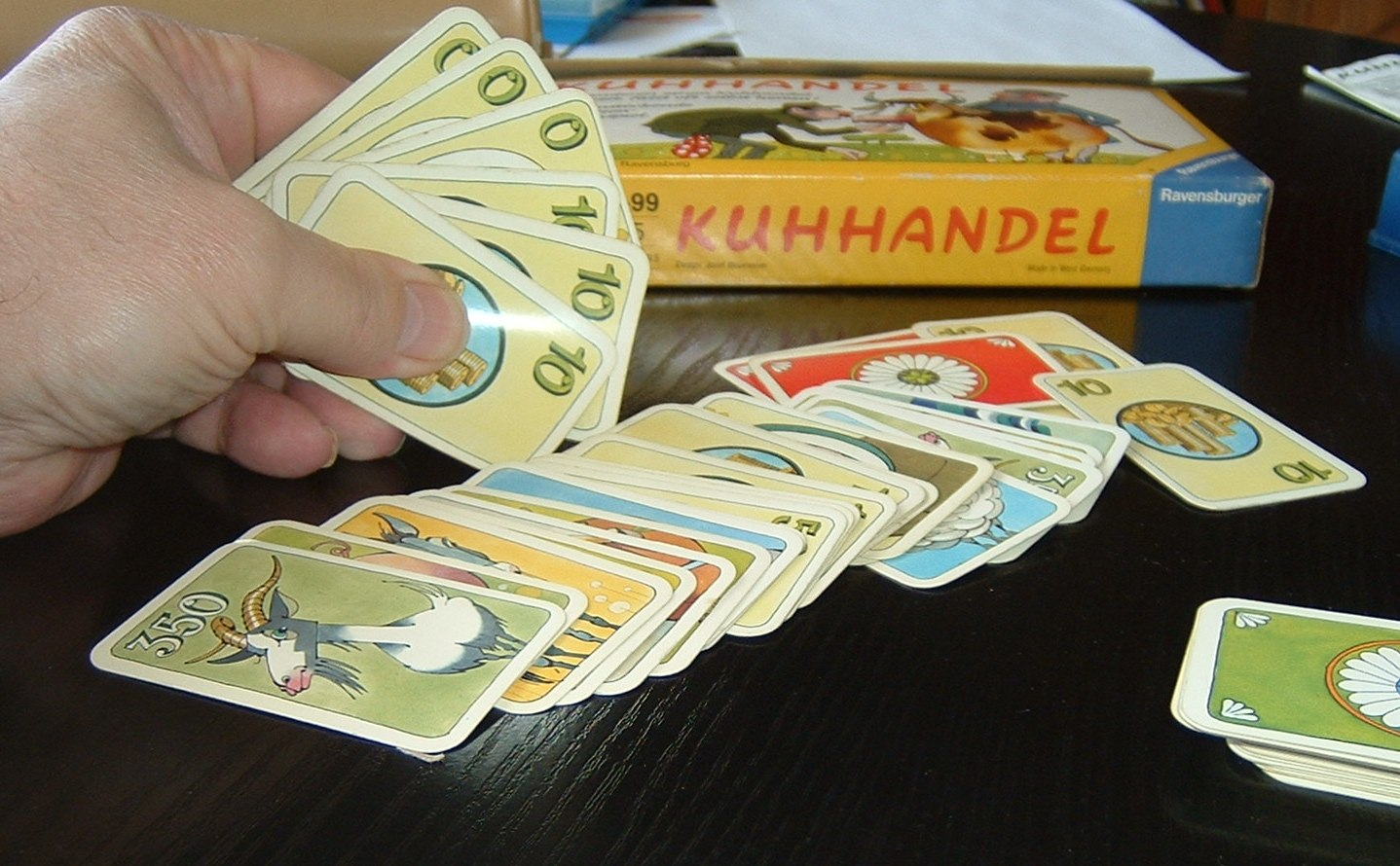 card game Kuhhandel. Ein Spieler bereitet einen Kuhhandel mit drei Nuller-Karten vor.